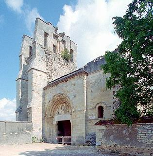 Notre-Dame-du-Pré , ruine de l'ancien prieuré clunisien de Donzy-le-Pré, façade ouest